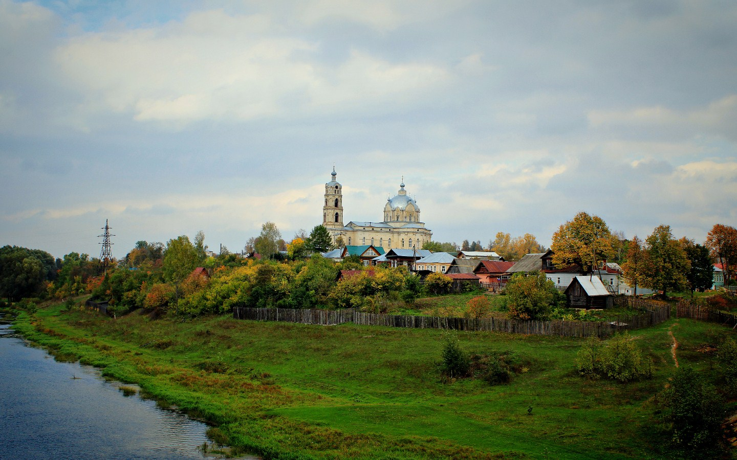 Церковь Пресвятой Троицы (Рязанская область, Касимов, посёлок Гусь-Железный, улица Ленина, 1, 10, 34, Октябрьская улица, 65, 66, 68)